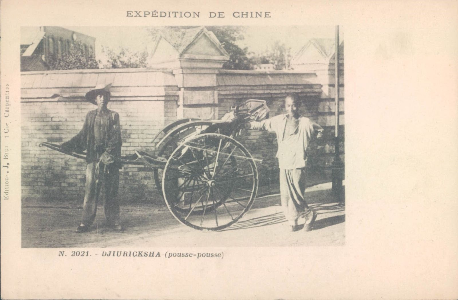 黄包车老照片。法文书写的：上面：《Expédition de Chine》（中国的远征），下面：《N 2021 Djiuriksha》(人力車)左面：《Éditions j. Brun et Cie Carpentras》(J.Brun & Cie, 卡庞特拉)